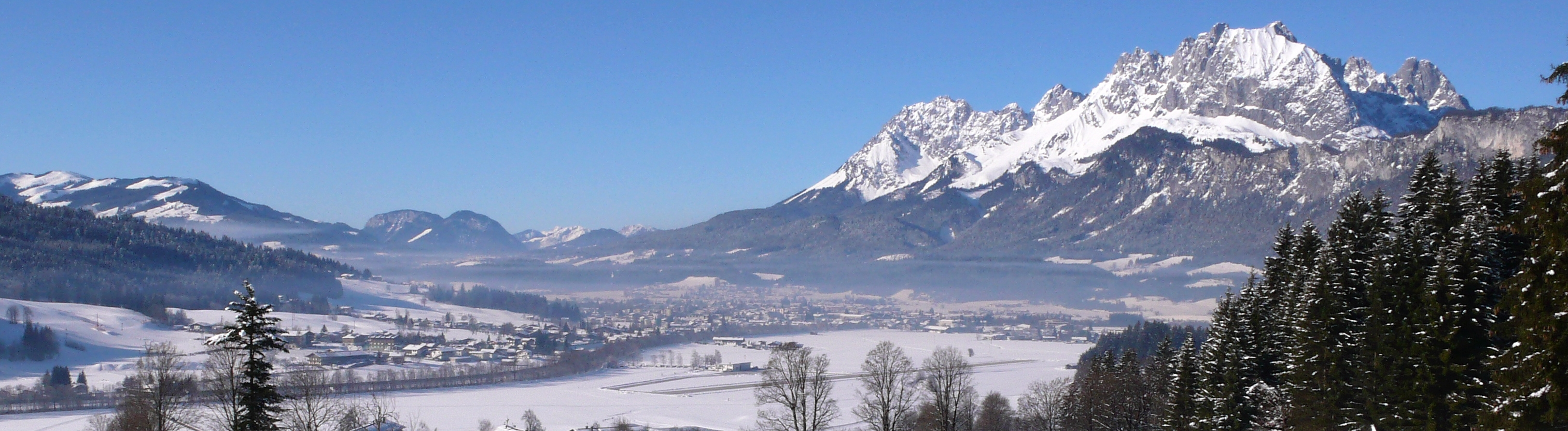 St. Johann in Tirol verkleinertes Panorama